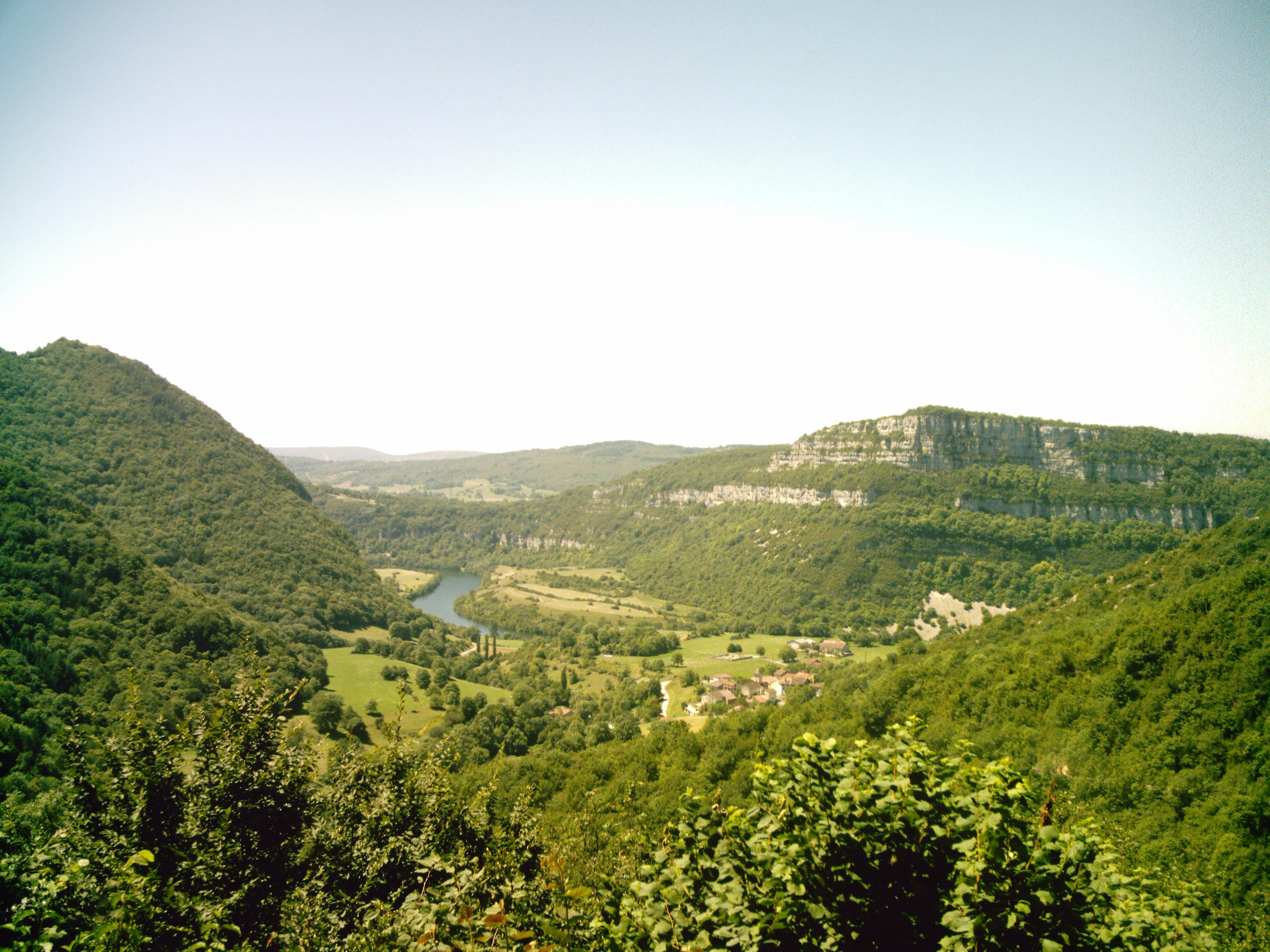 Vue du village de Bolozon, de la vallée de l'Ain, et de la rivière d'Ain.